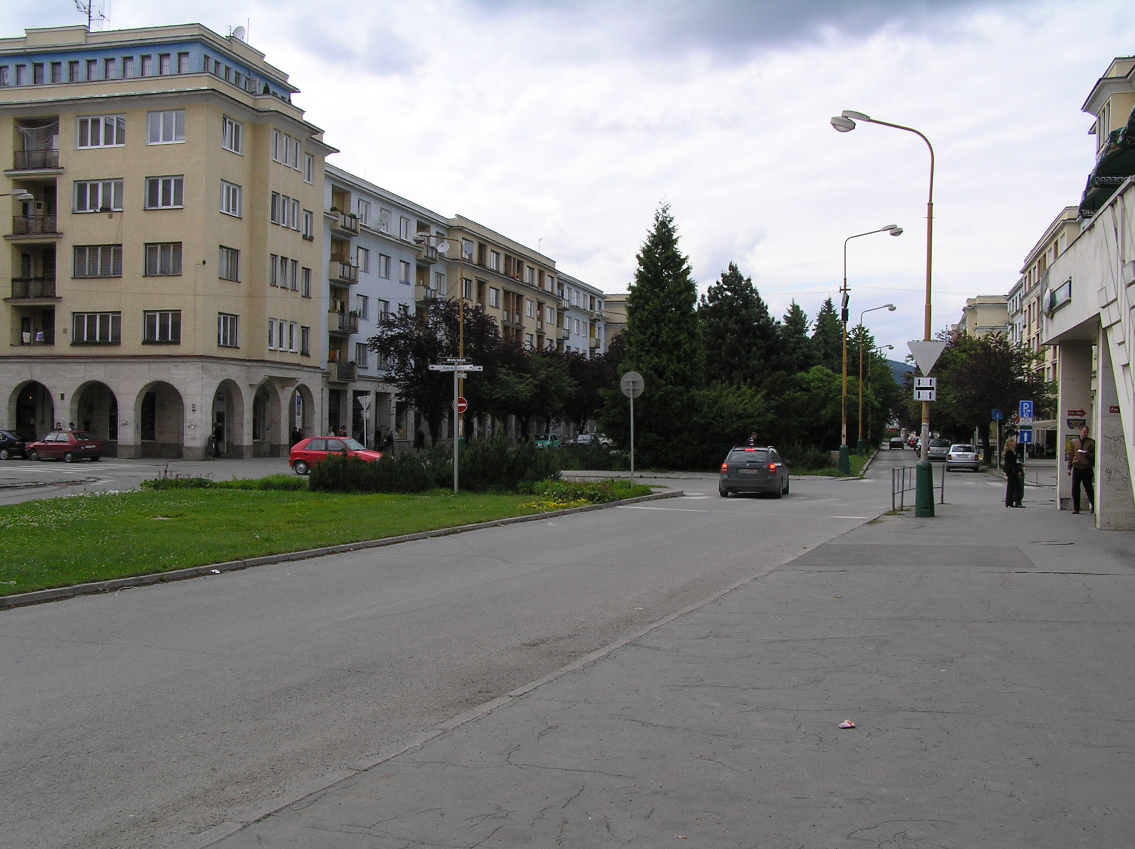 Žilina, Bulvár